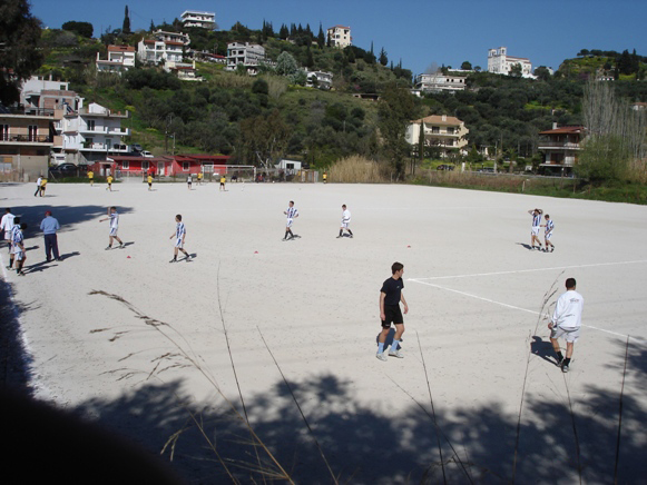 Zavlani Greece